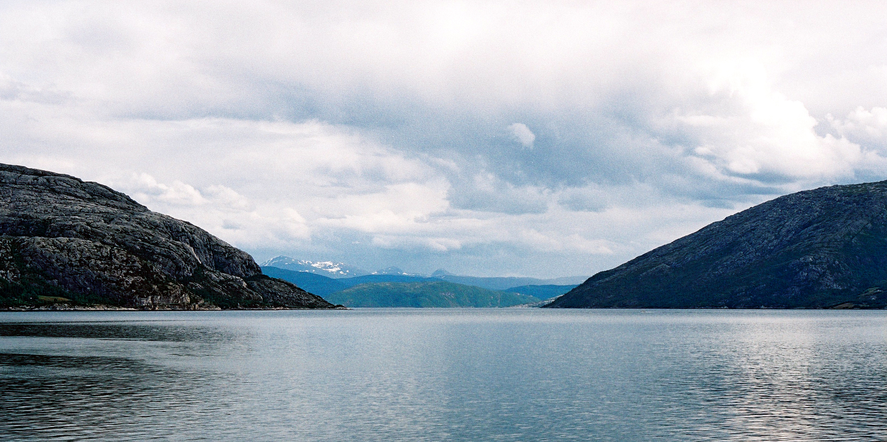 Vefsnfjorden, Nordland. Mosjøen innerst i fjordbunnen.